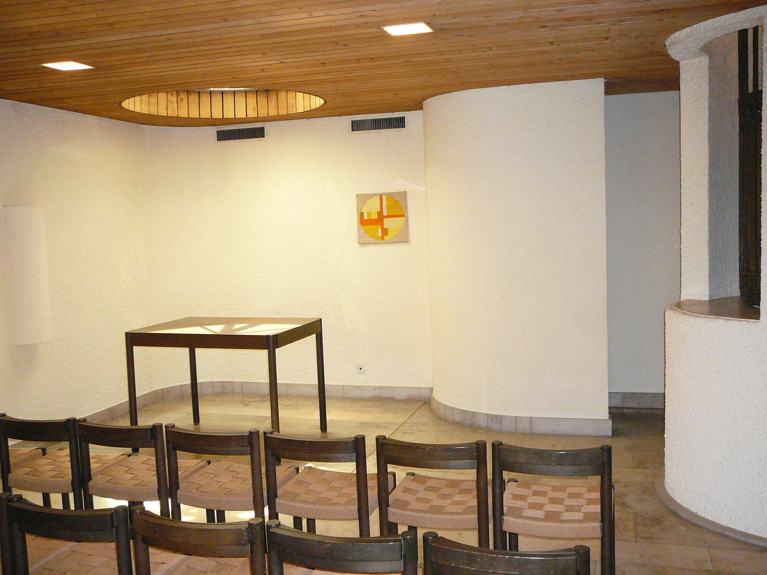 Römisch-katholische Pfarrkirche St. Anna, Opfikon-Glattbrugg, Kapelle